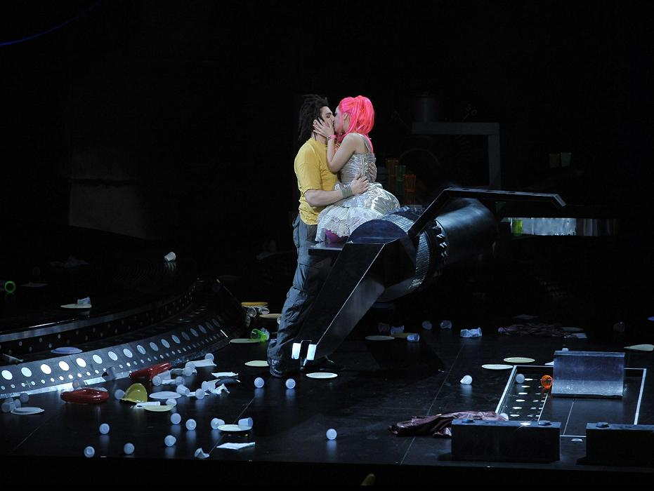 Roméo et Juliette nell'allestimento di Damiano Michieletto alla Fenice nel 2009